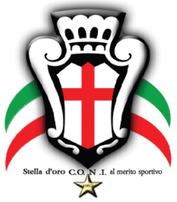 Stemma della A.s.d. Società Ginnastica Pro Vercelli 1892 Stella d'oro al Merito Sportivo 1967